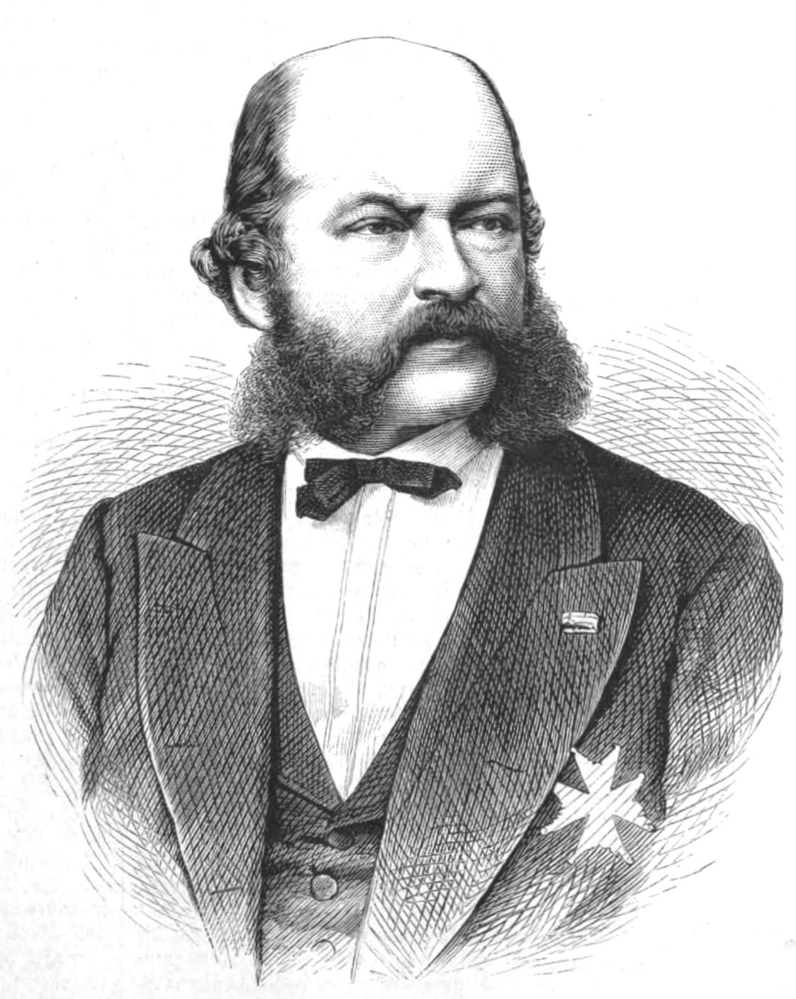 Freiherr Max Maria von Weber